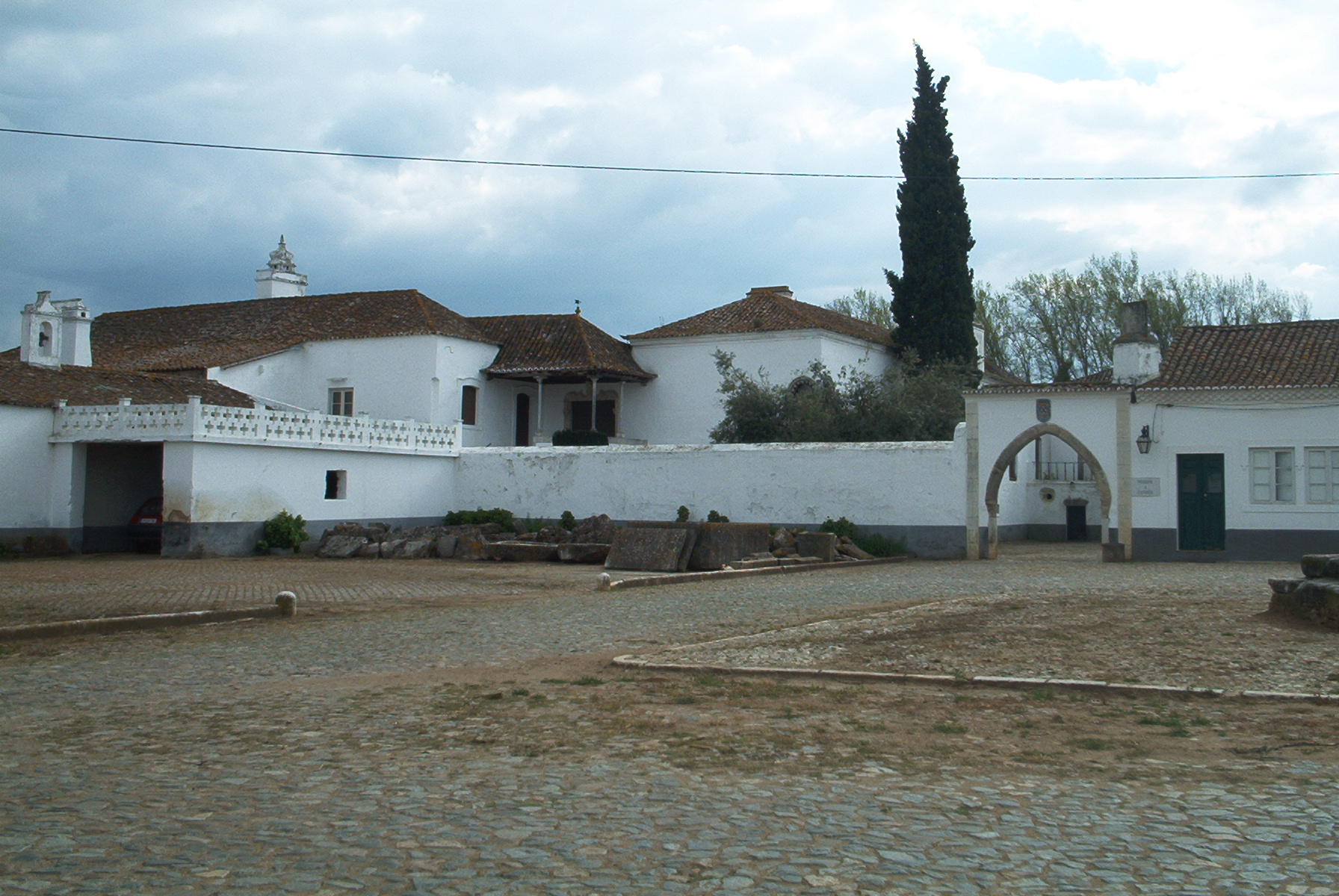 Águas de Peixe. Alvito. Portugal.